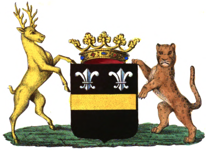 Armoiries de la famille Errembault de Dudzeele